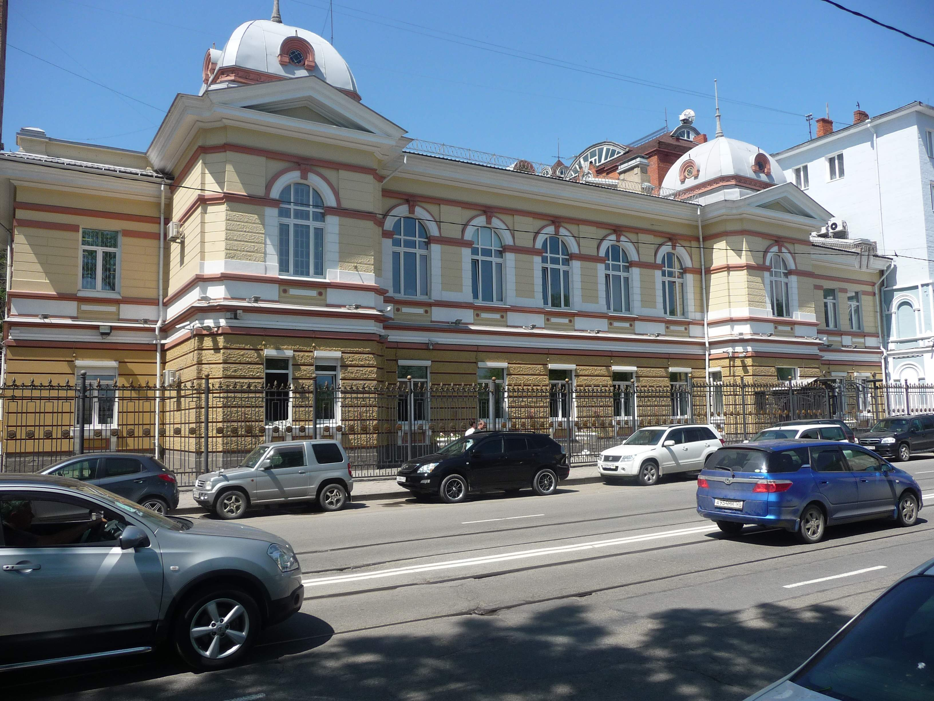 Владивосток, ул. Светланская, 71, 2012-07-05